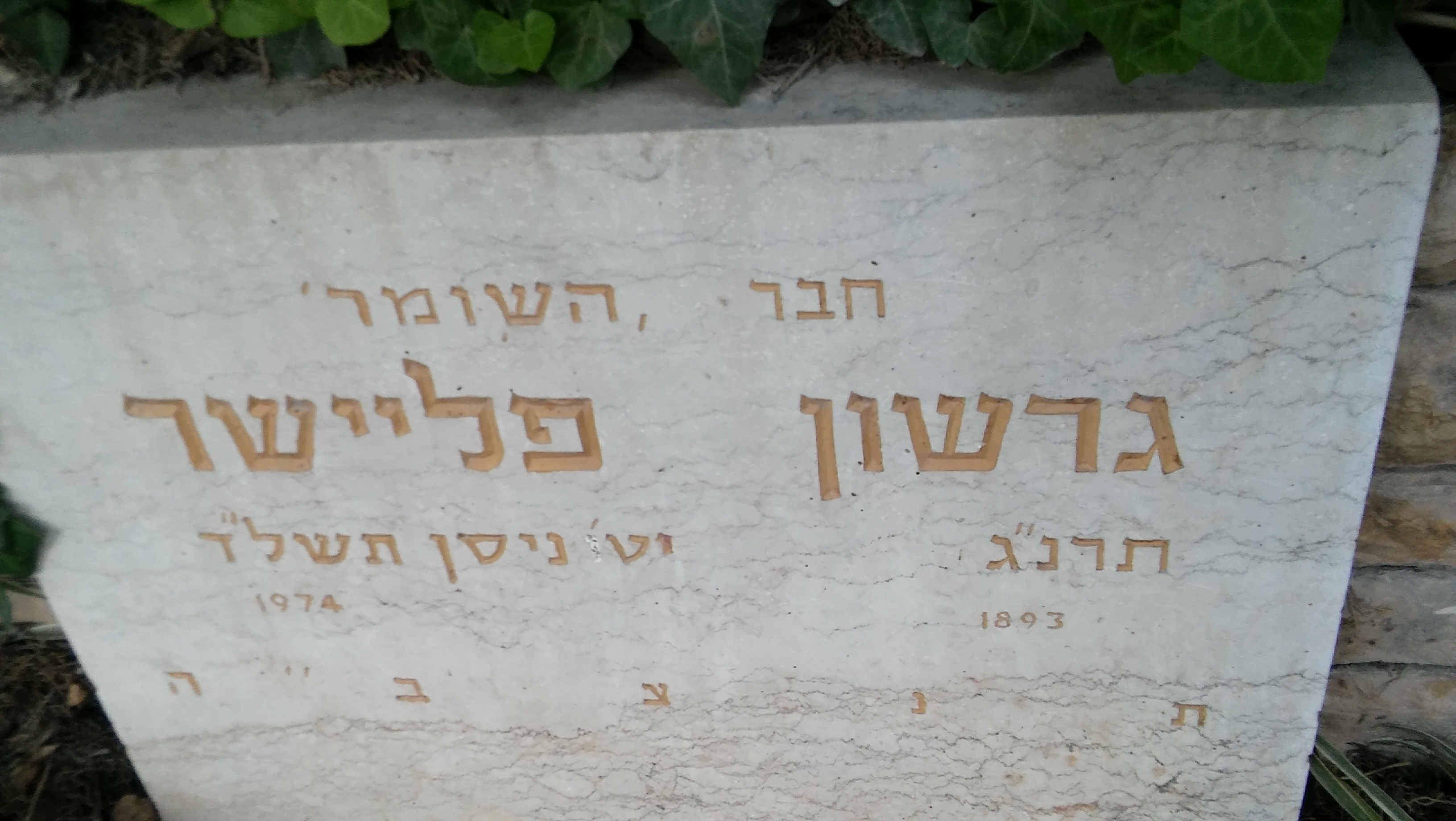 המצבה של גרשון פליישר בחלקת השומר בבית הקברות של כפר גלעדי